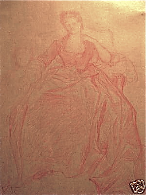 sanguine préparatoire au tableau. Alexandre Cabanel